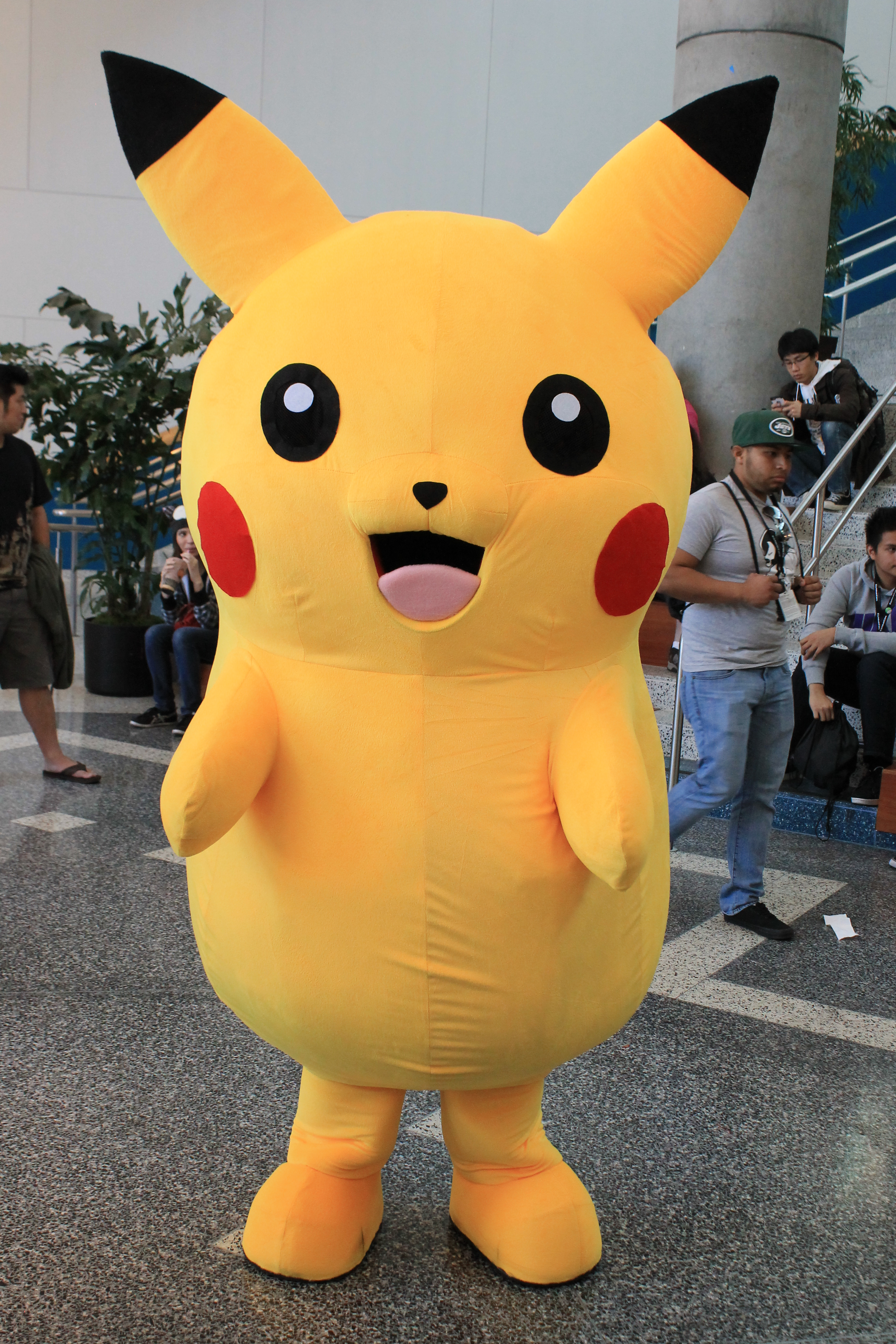 Fanime 2015 750